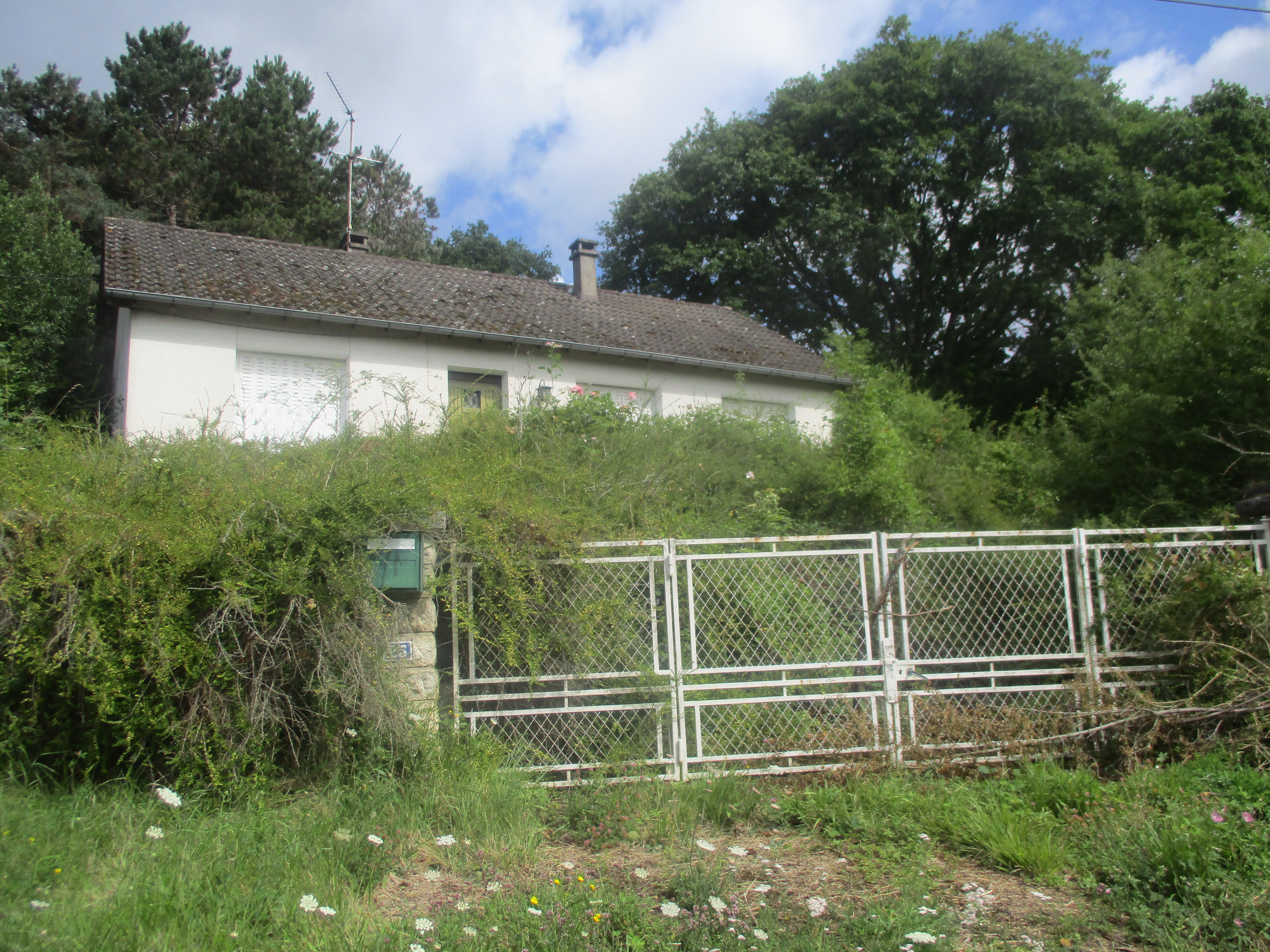 Maison de J.-P. Treiber, assassin suspecté de Katia Lherbier et Nathalie Giraud.